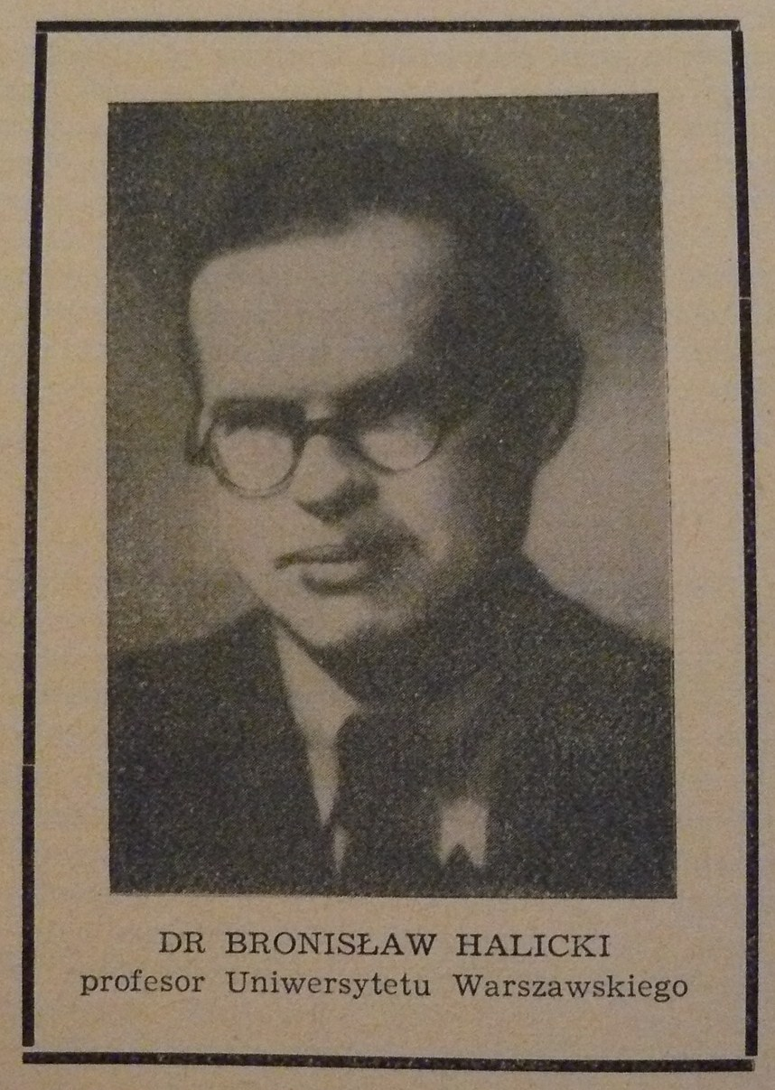 Bronisław Halicki - polski geolog.